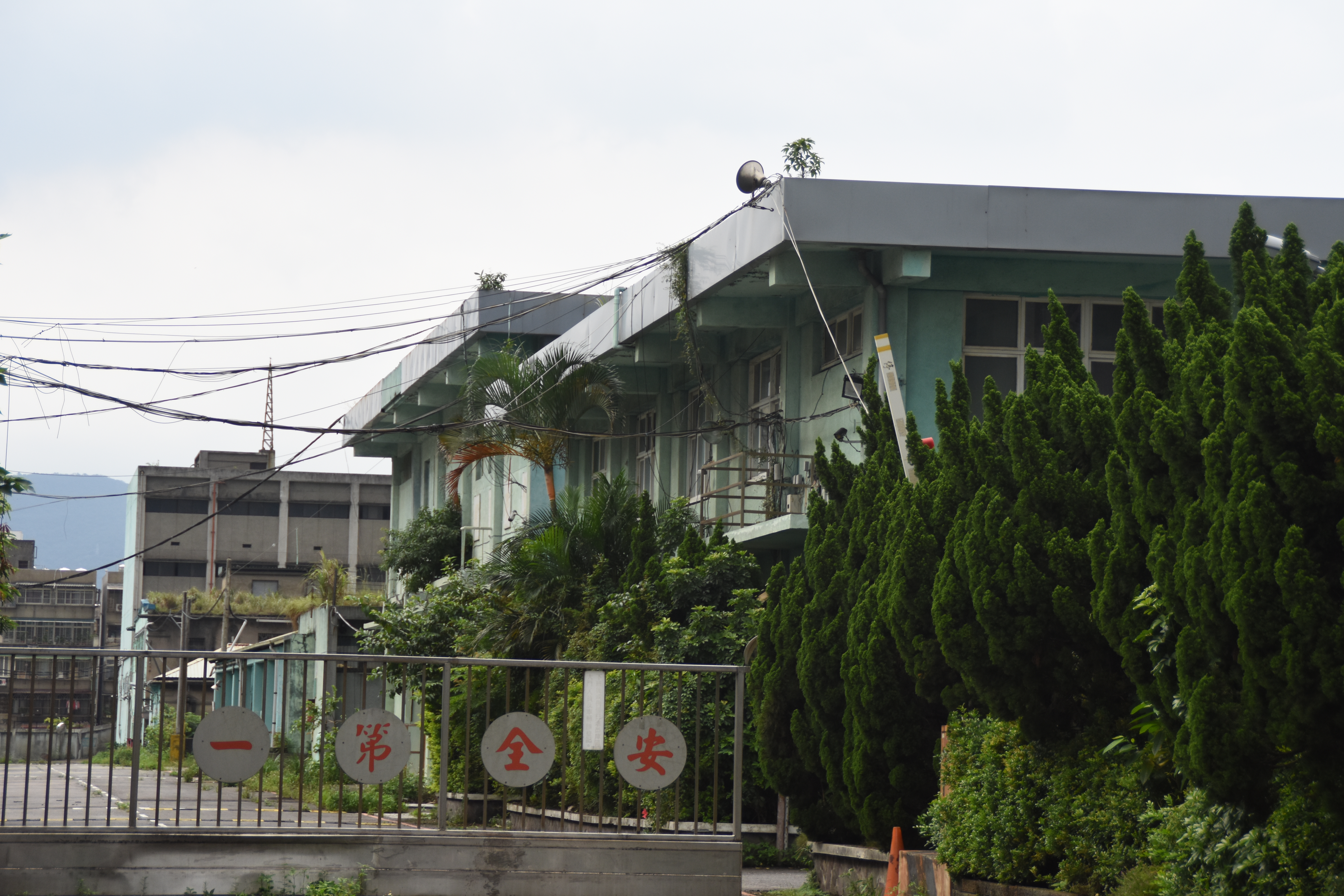 中文（台灣）: 南港臺電倉庫